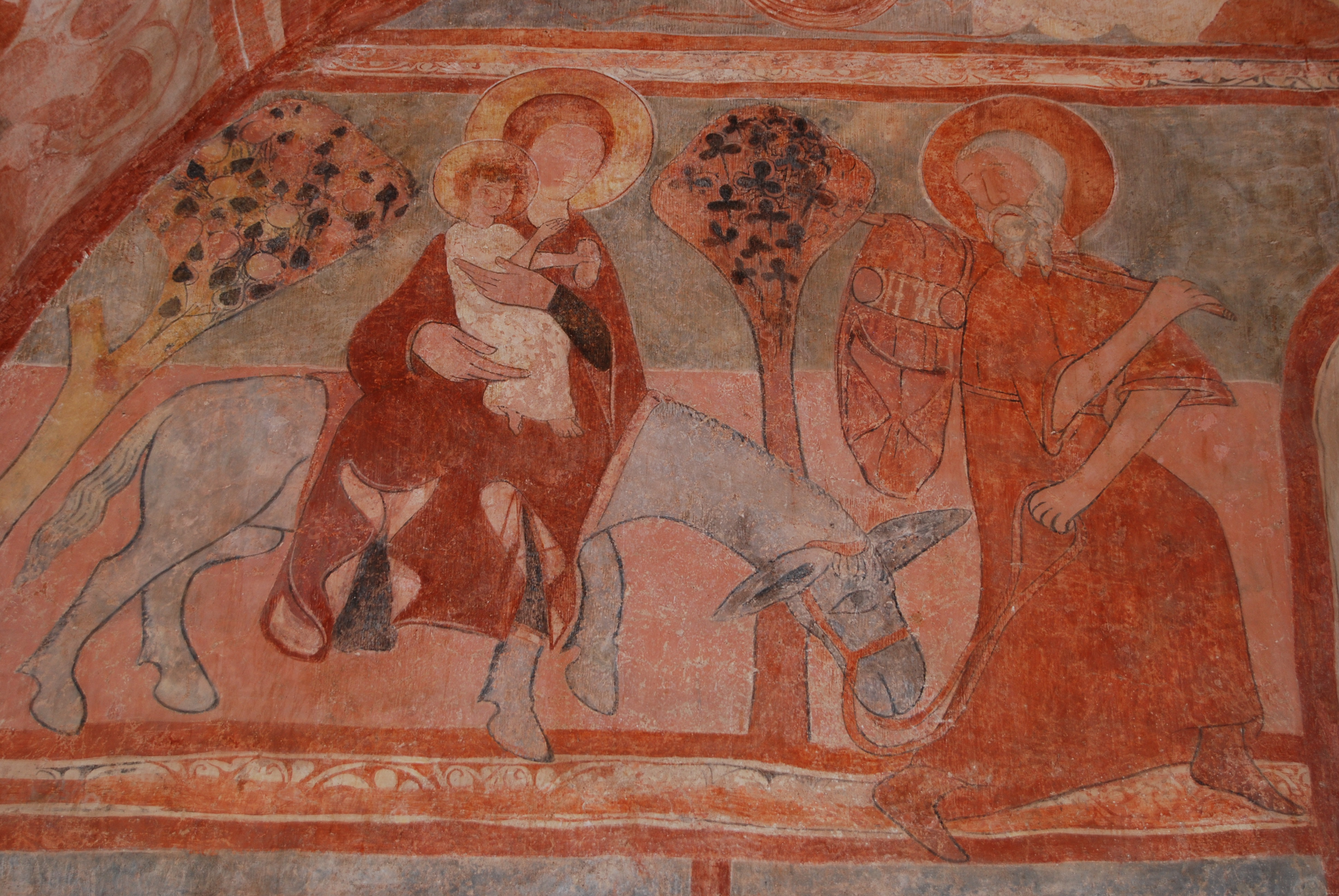 XIII. századi freskó a csécsi református templomban (Szlovákia)